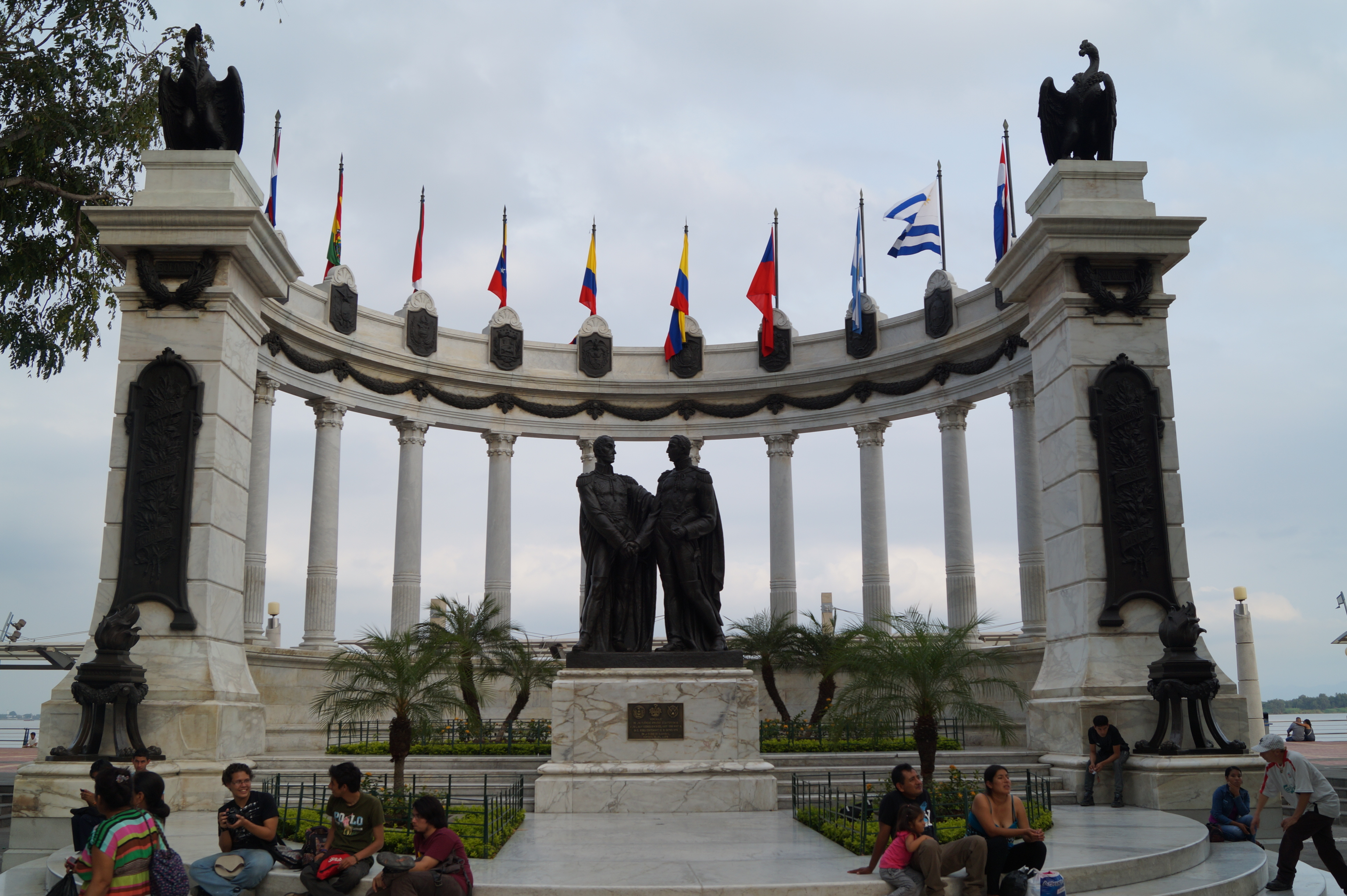 Hemiciclo de la Rotonda, Guayaquil, Ecuador.